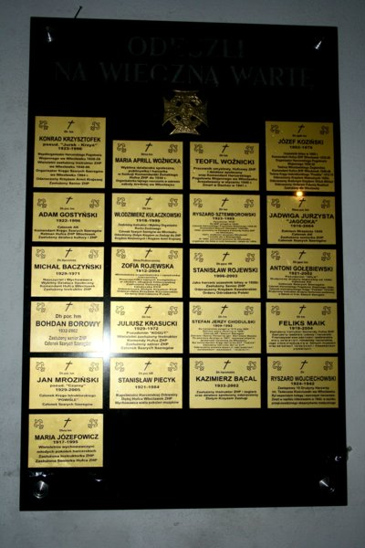 Uroczystość odsłonięcia tablic pamiątkowych poświęconych seniorom włocławskiego harcerstwa. Włocławek - kościół pw. Najświętszego Zbawiciela - 26 marca 2006 roku.